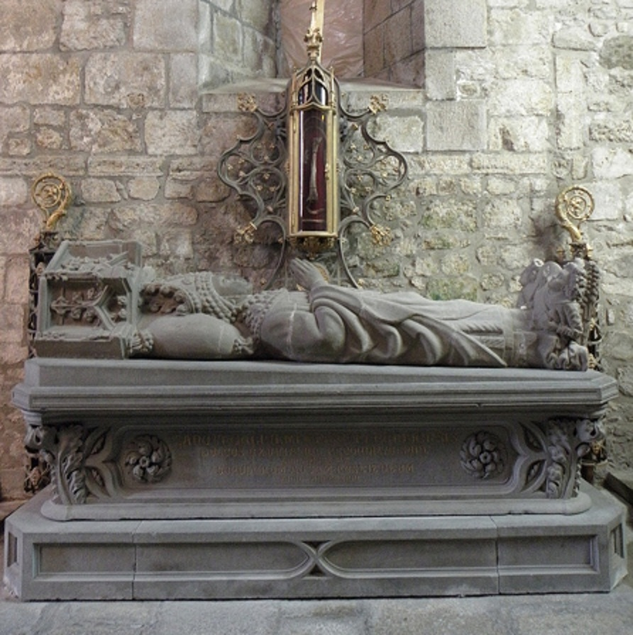 Tombeau de Saint-Guillaume Pinchon, évêque de Saint-Brieuc (1220-1224), en la cathédrale Saint-Étienne de Saint-Brieuc (22).